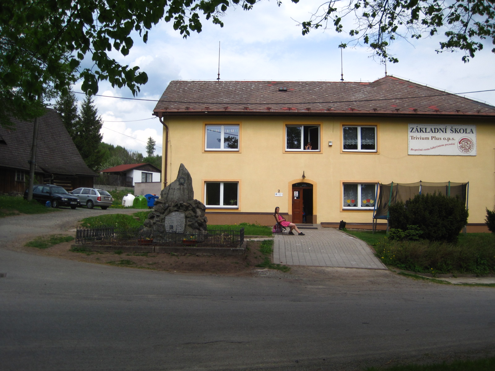 Dobřany (v Orlických horách) - základní škola na návsi